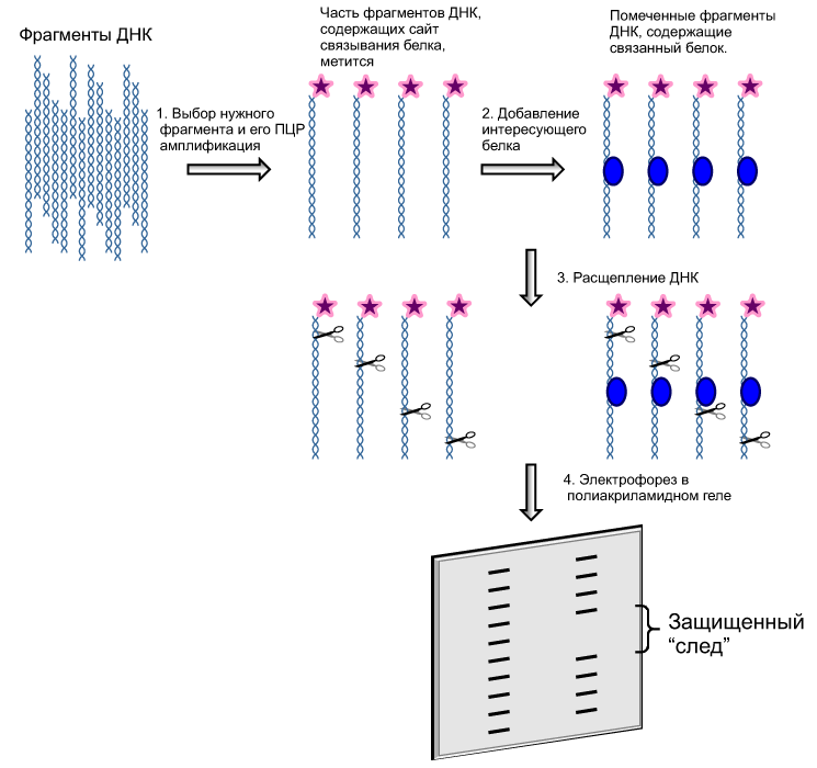 Схема экспермента по футпринтингу ДНК (перевод)